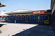 Standort an der Klingentalstrasse